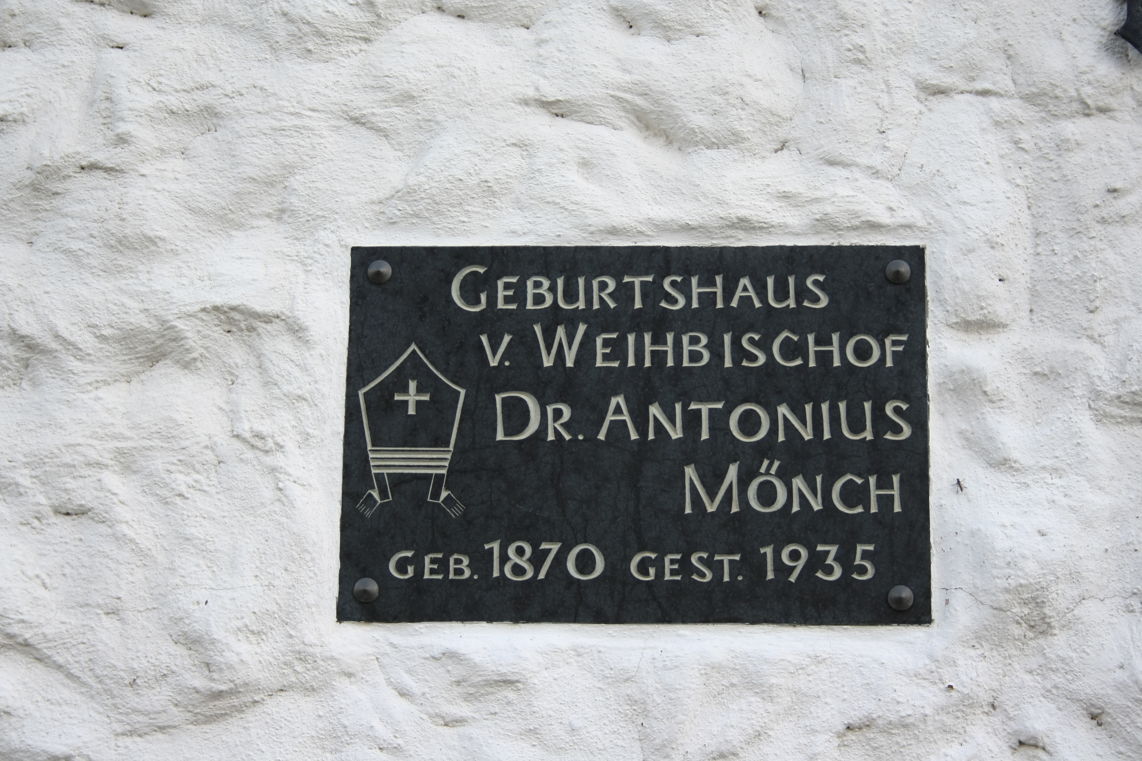 Gedenktafel für Antonius Mönch (Weihbischof in Trier) in der Anton-Mönch-Straße 12 in Holzweiler (Gemeinde Grafschaft)